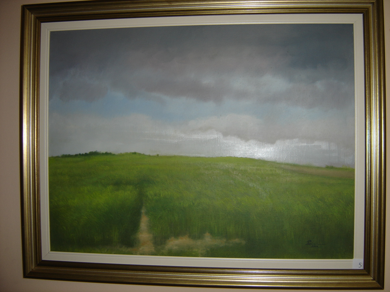 Dragan Petrovski, slika "Zeleno žito"